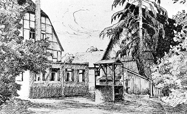 Original image description from the Deutsche Fotothek Dresden-Briesnitz. Schoner Mühle, aus: Meiche 1927